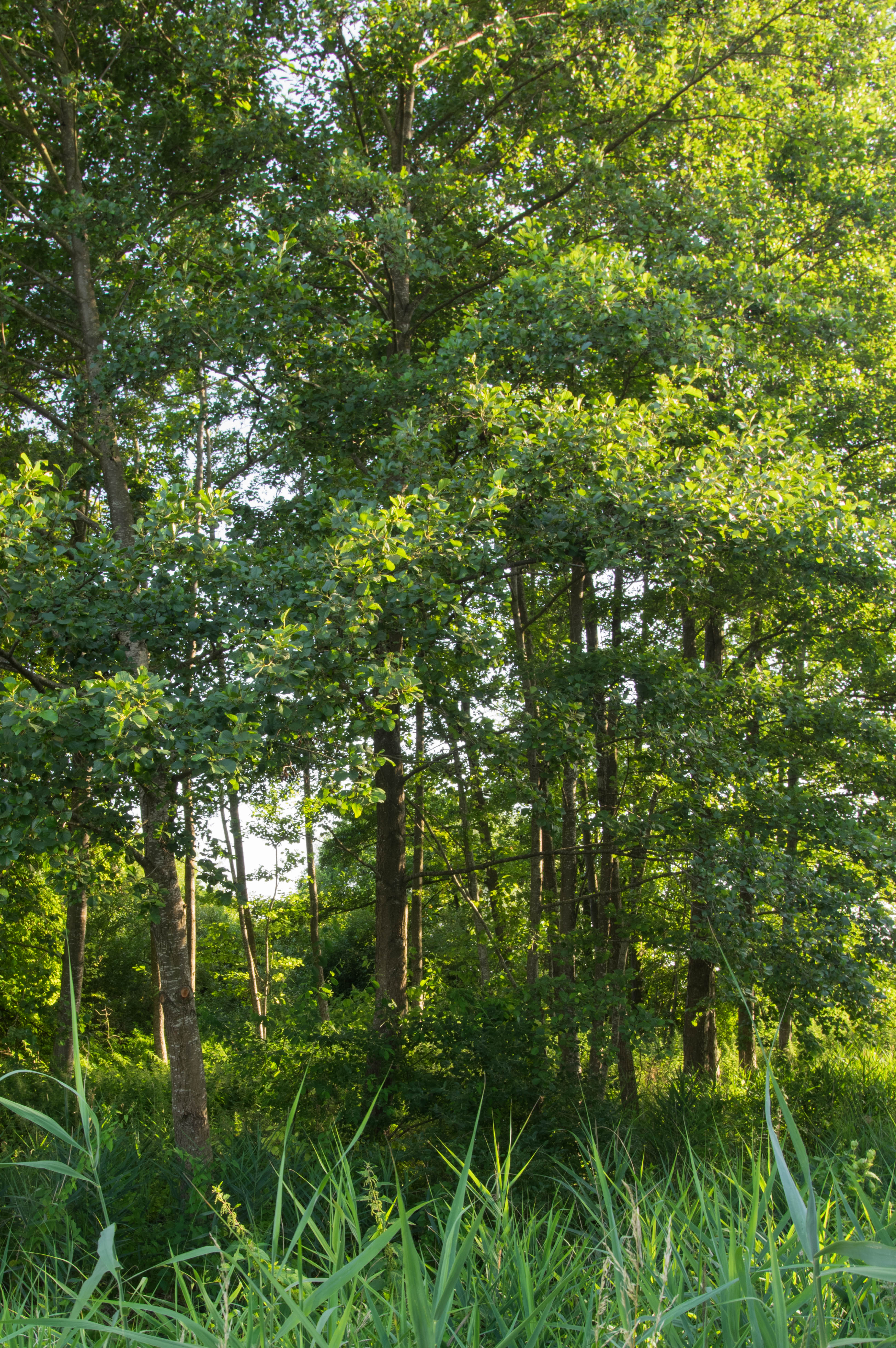 Kleiner Erlenhain inmitten des Landschaftsschutzgebietes Langweidlegraben, östlich von Heißesheim, Gemeinde Mertingen. Gelistet unter Nr. LSG-00314.01